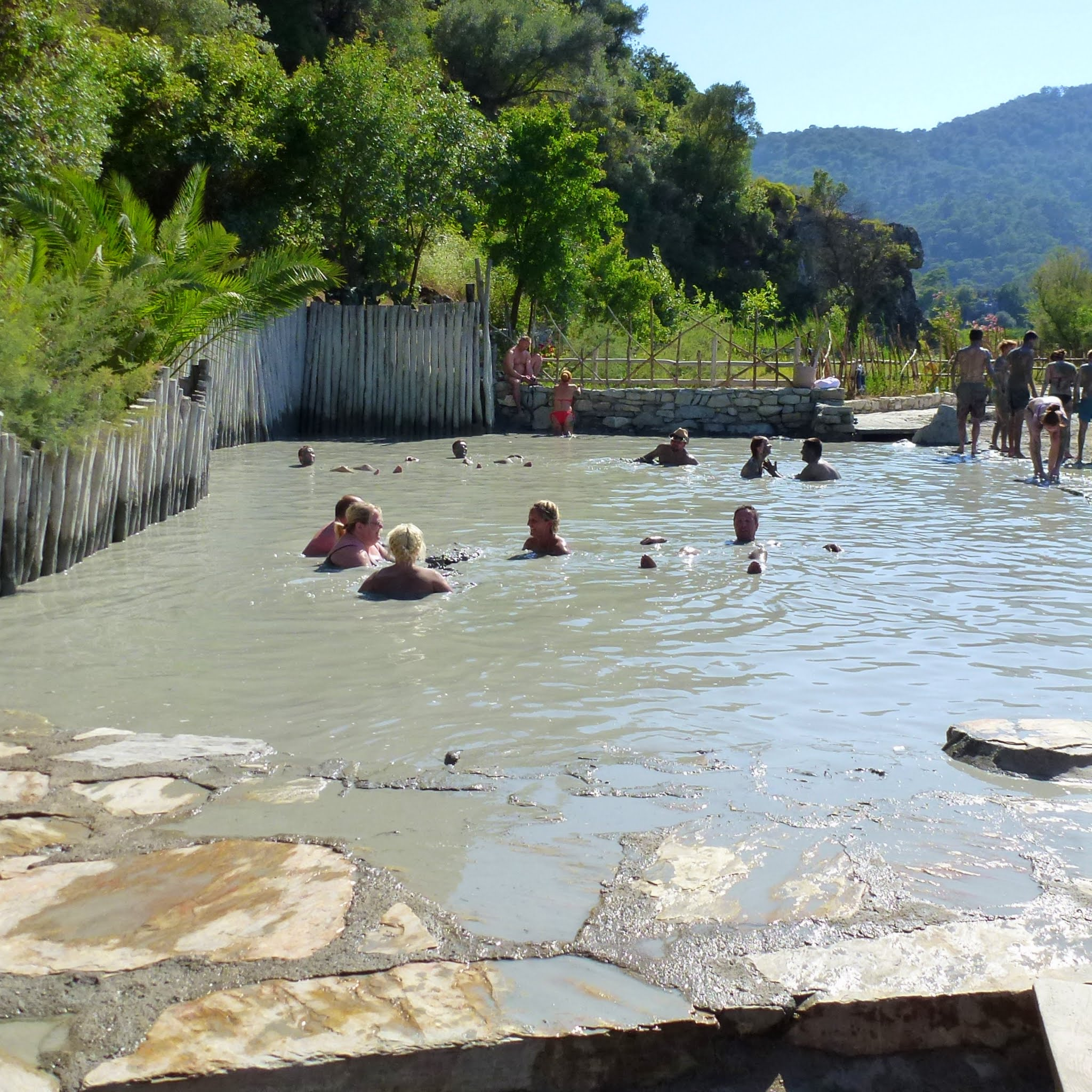 Dalyan, Mud Bath